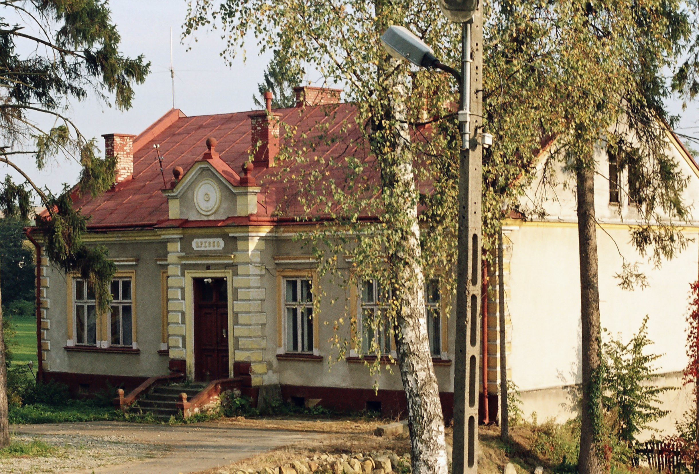 Dom parafialny w Bieździedzy